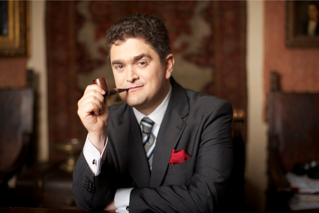 Theodor Paleologu fotografie